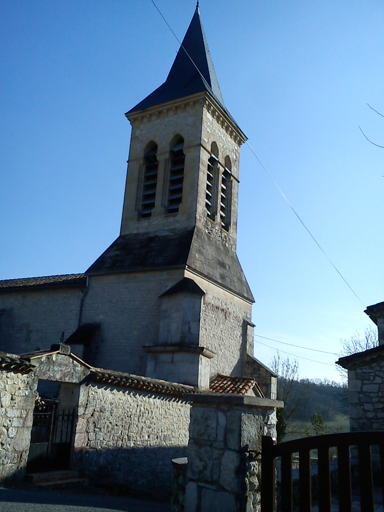 Église d'Anthé